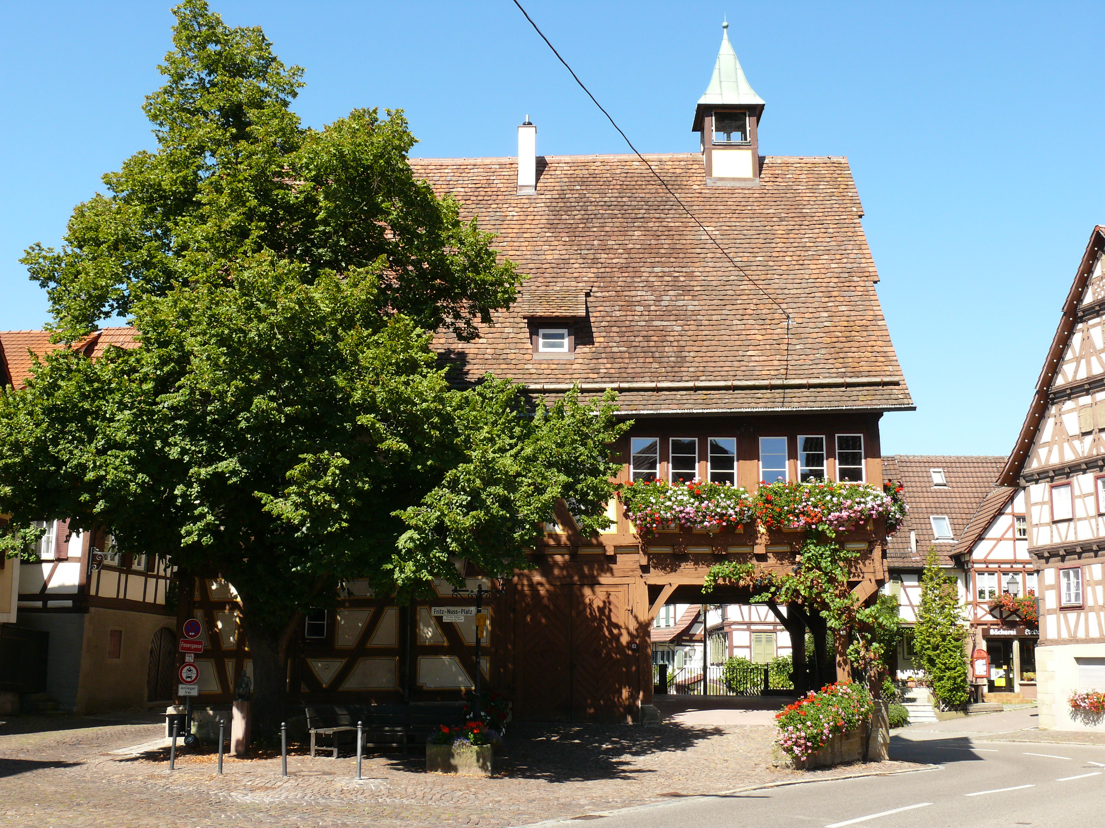 Das historische Rathaus in Weinstadt-Strümpfelbach.